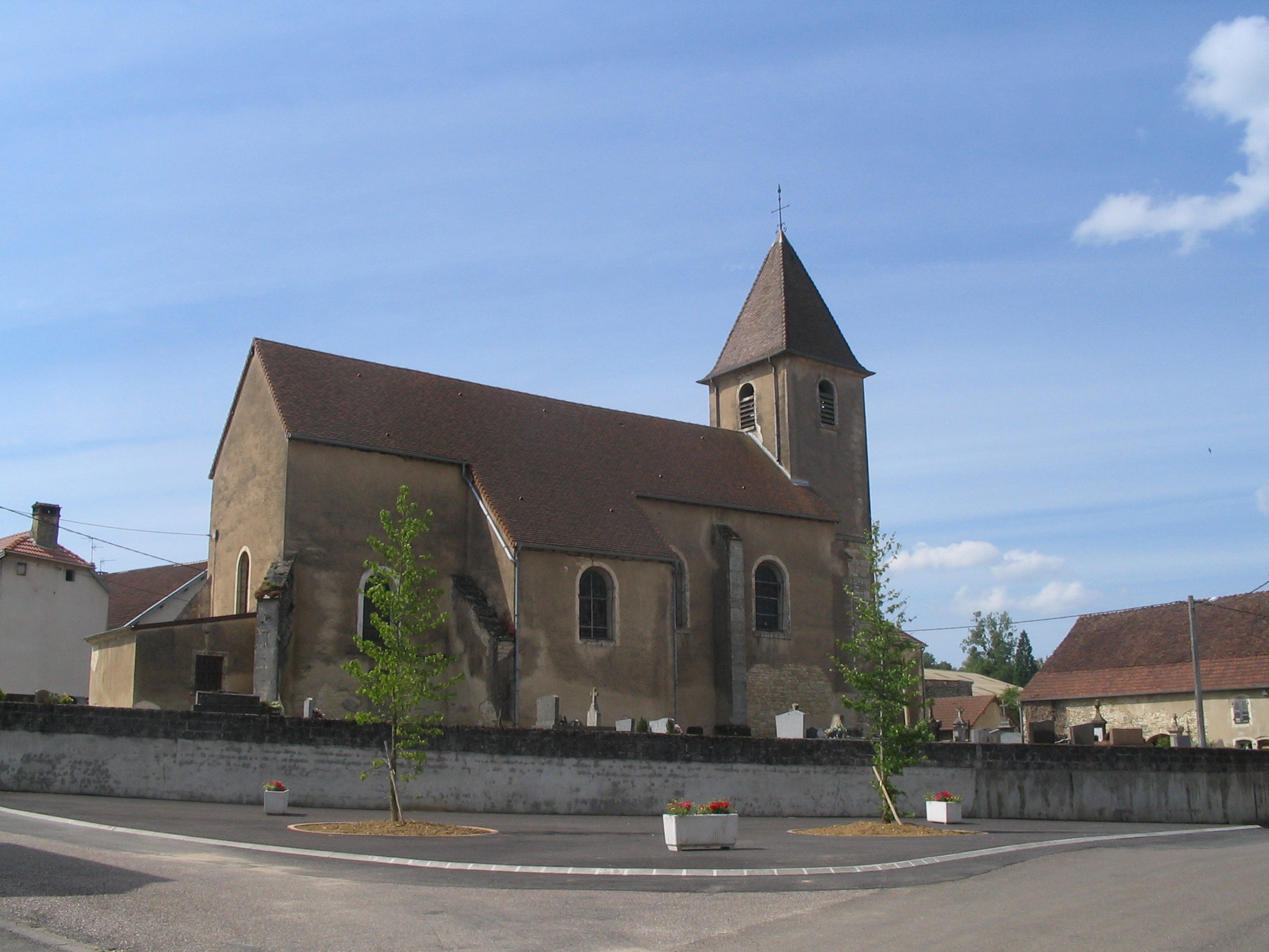 Eglise de Chantes